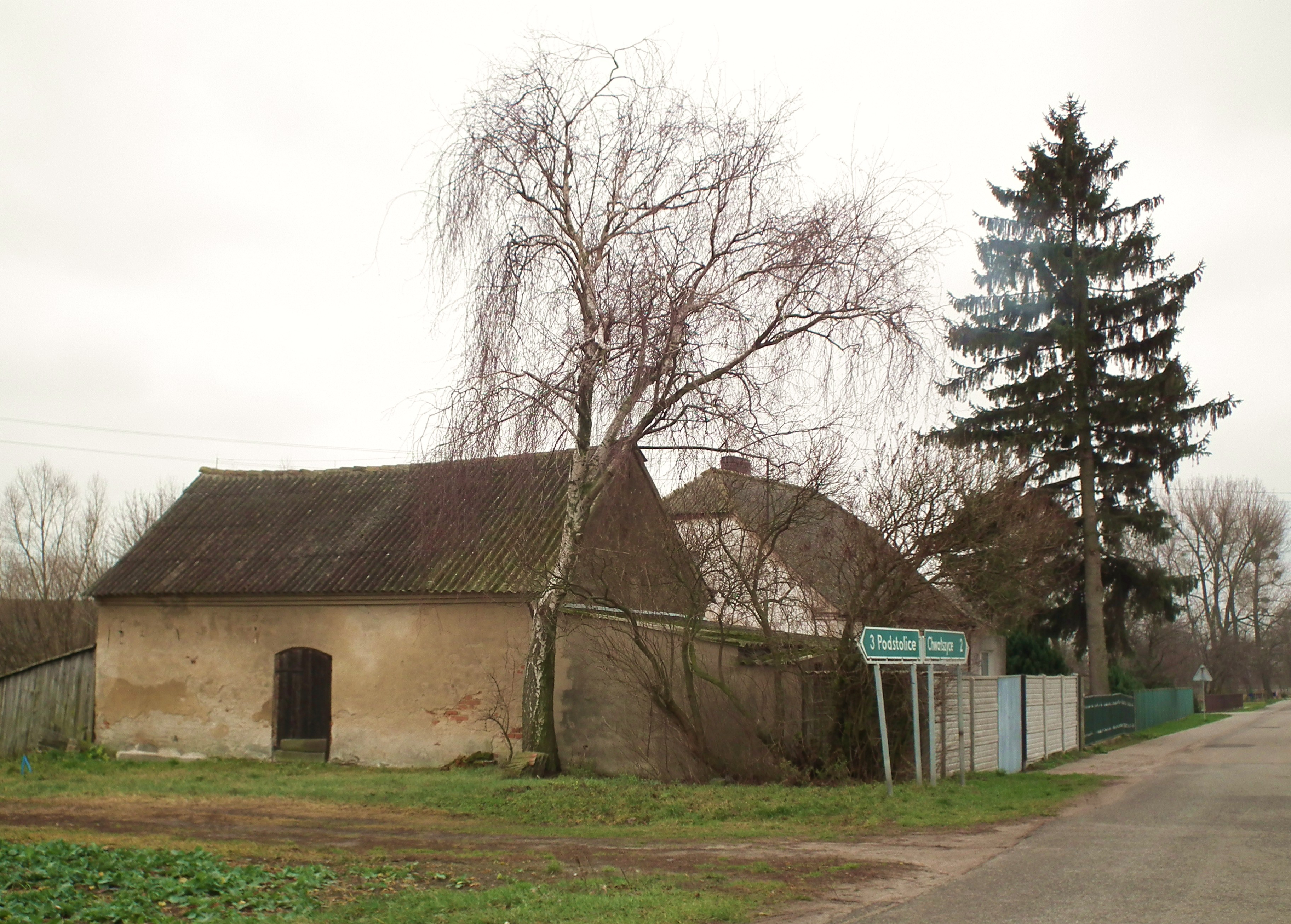 Gąsiorowo w gm. Nekla.